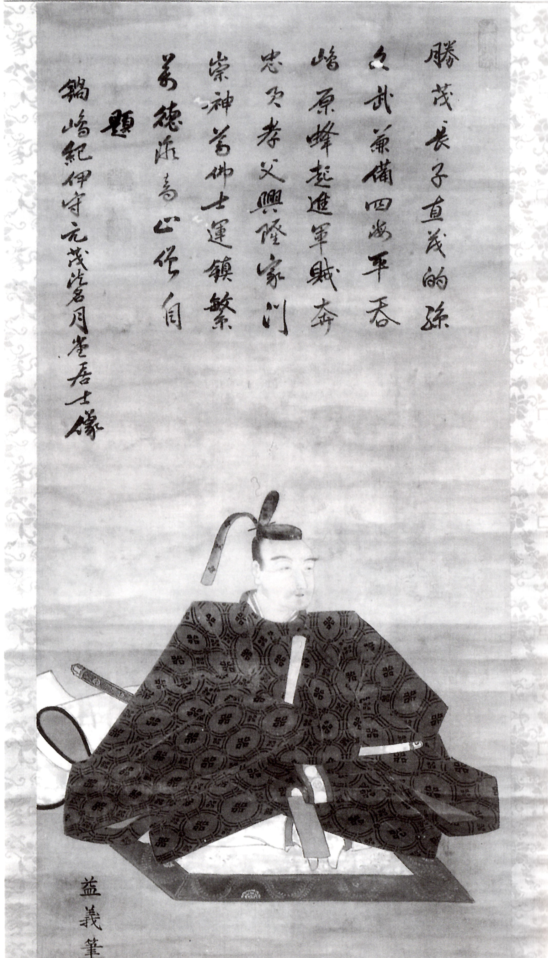 鍋島元茂の肖像。